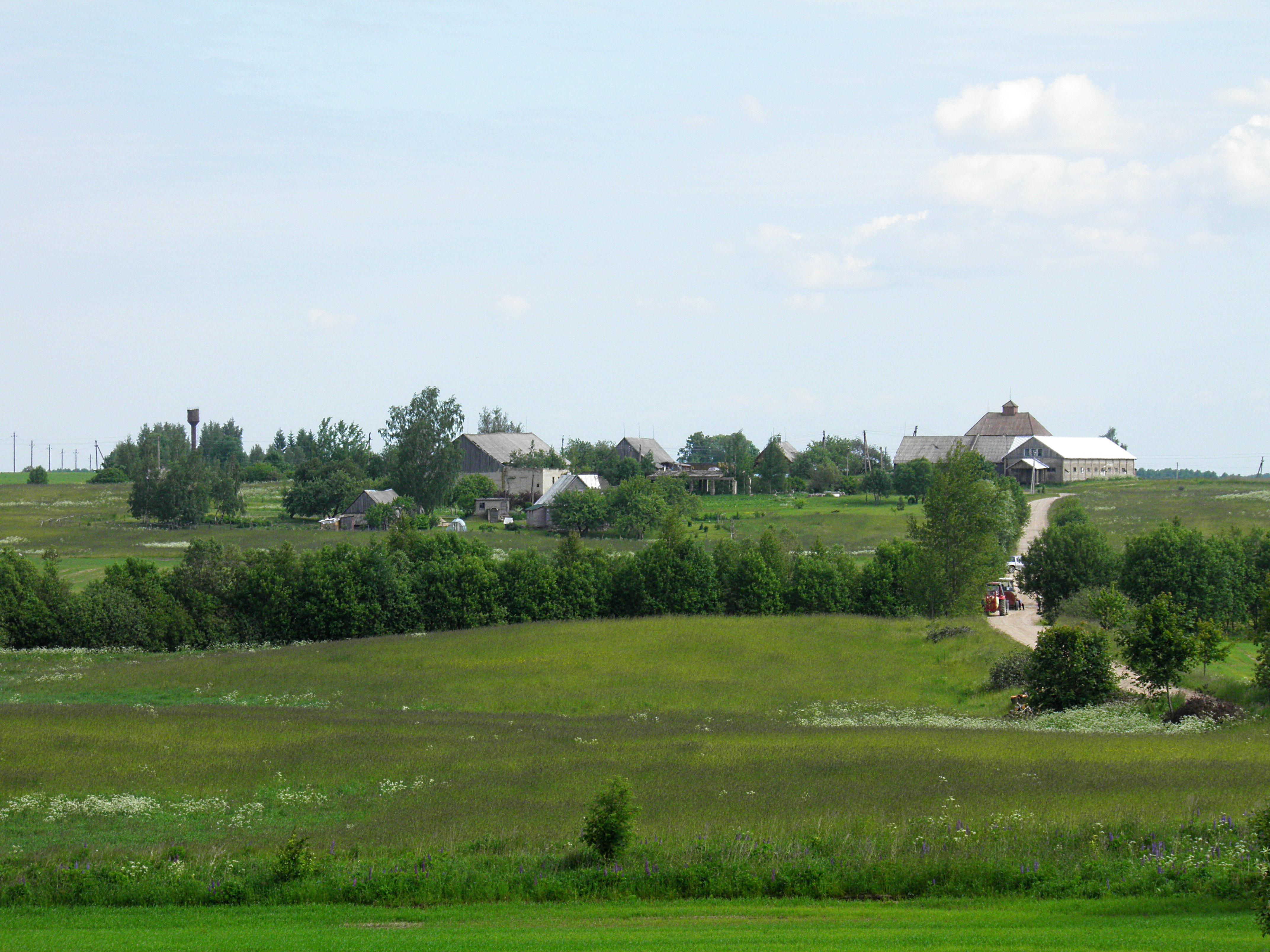 Bučiūnai